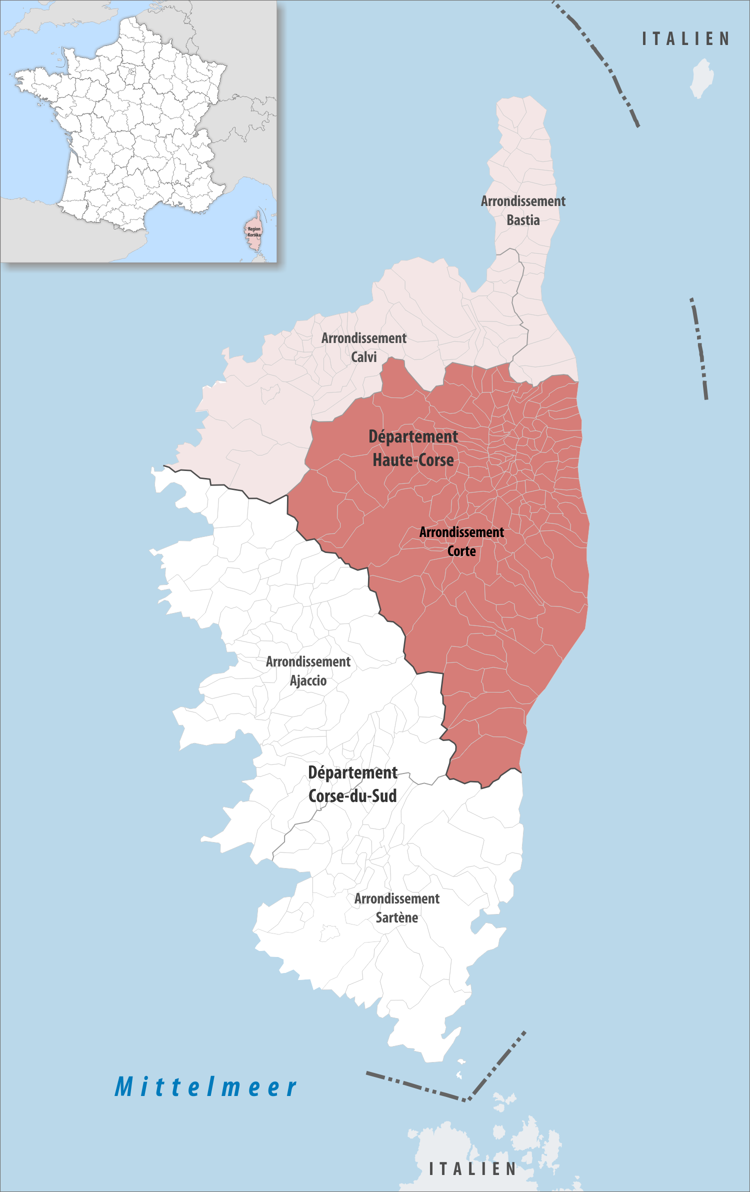 Lage des Arrondissements Corte